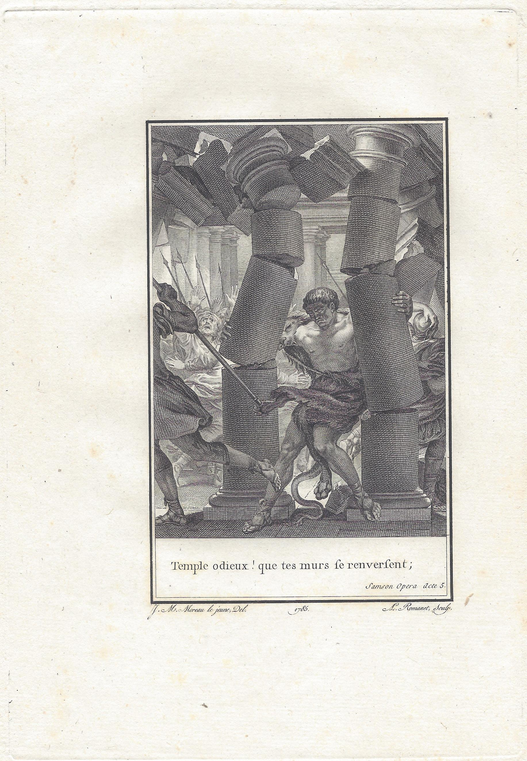 Voltaire: Samson Akt 5 Kupferstich von Antoine Louis Romanet nach Jean-Michel Moreau